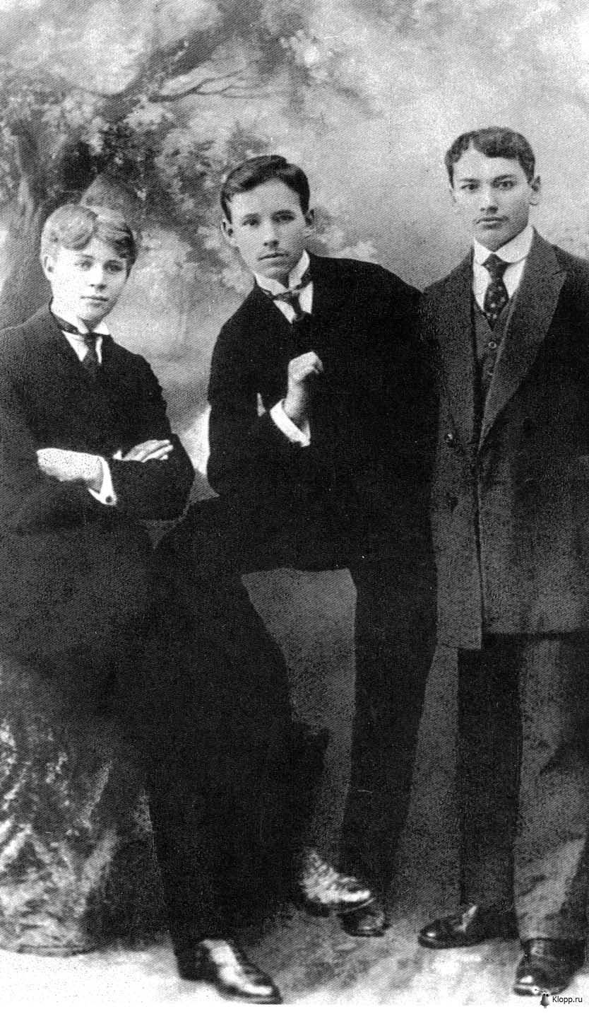 С. А. Есенин с друзьями юности (предположительно с Г. Н. Пылаевым и В. Н. Наумовым). 1914 г., январь. Москва.